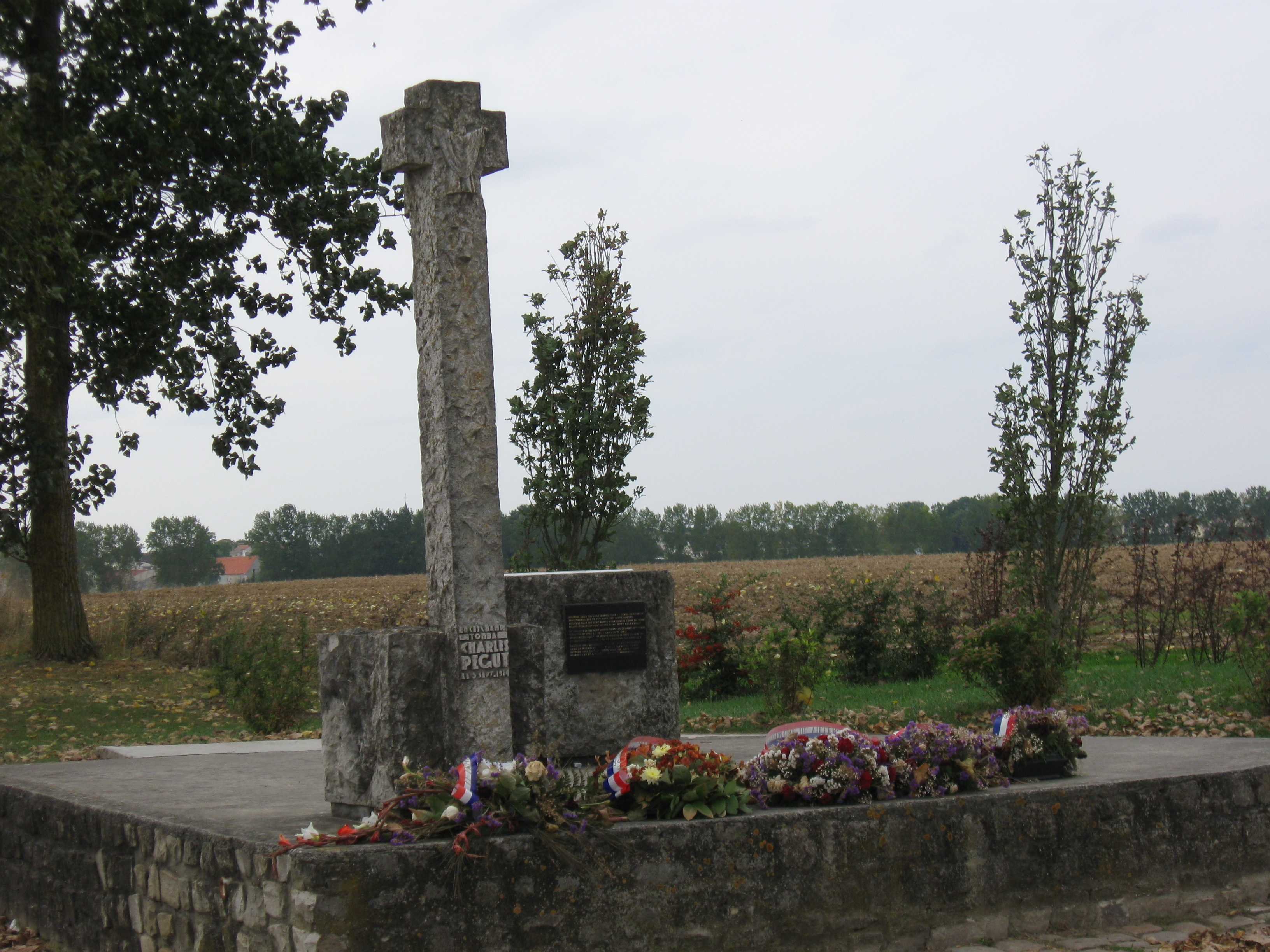 Monument commémorant la mort de Charles Péguy. (Commune de Villeroy, Seine-et-Marne, Île-de-France).